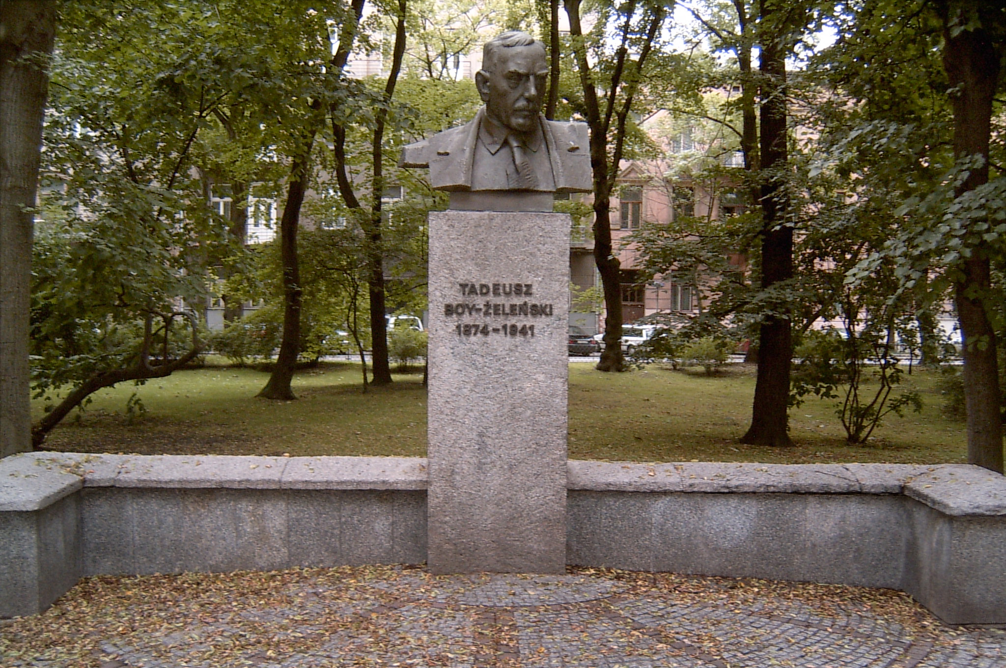 Tadeusz Boy-Żeleński Monument in Kraków, Poland